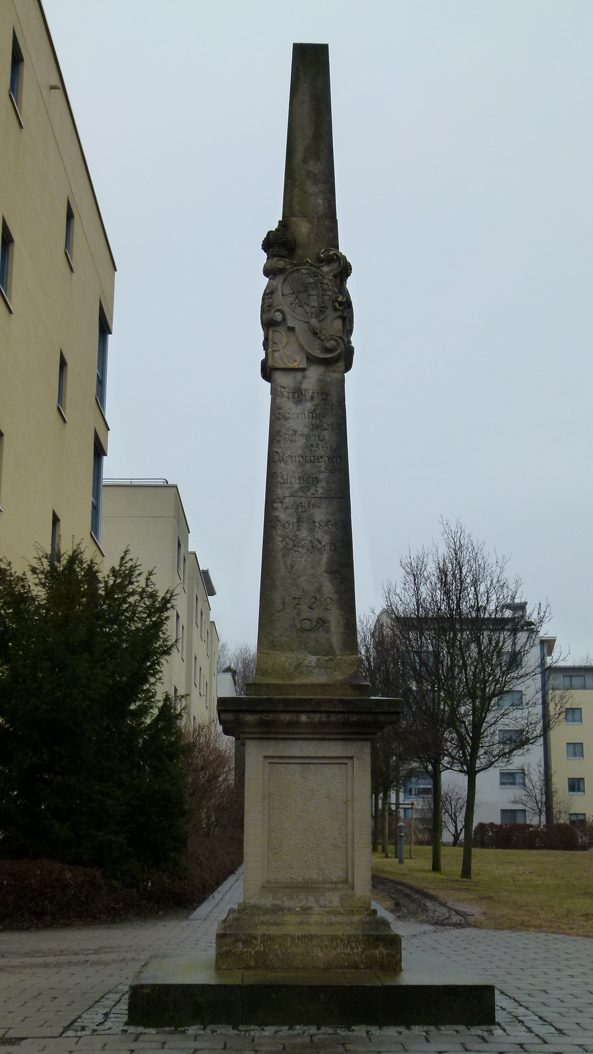 Nachbildung einer Postmeilensäule, Münzmeisterstaße 14b, Zschertnitz, Dresden